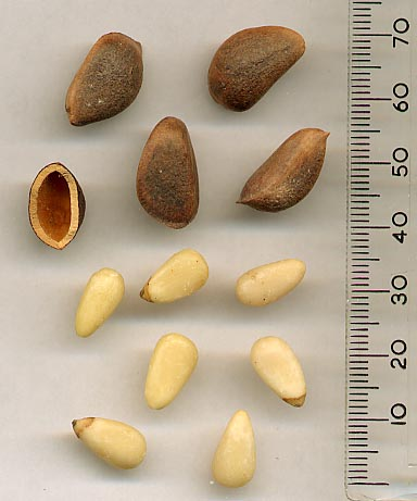 Korean Pine Pinus koraiensis pine nuts.